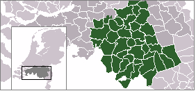 zelfgemaakt naar bron Geschiedenis Brabant